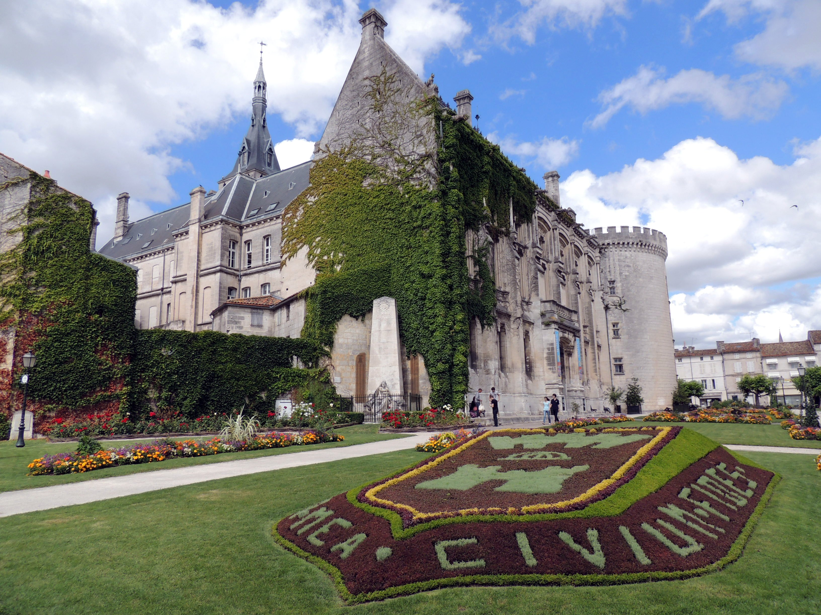 Hotel de ville - Angouleme - Francia .